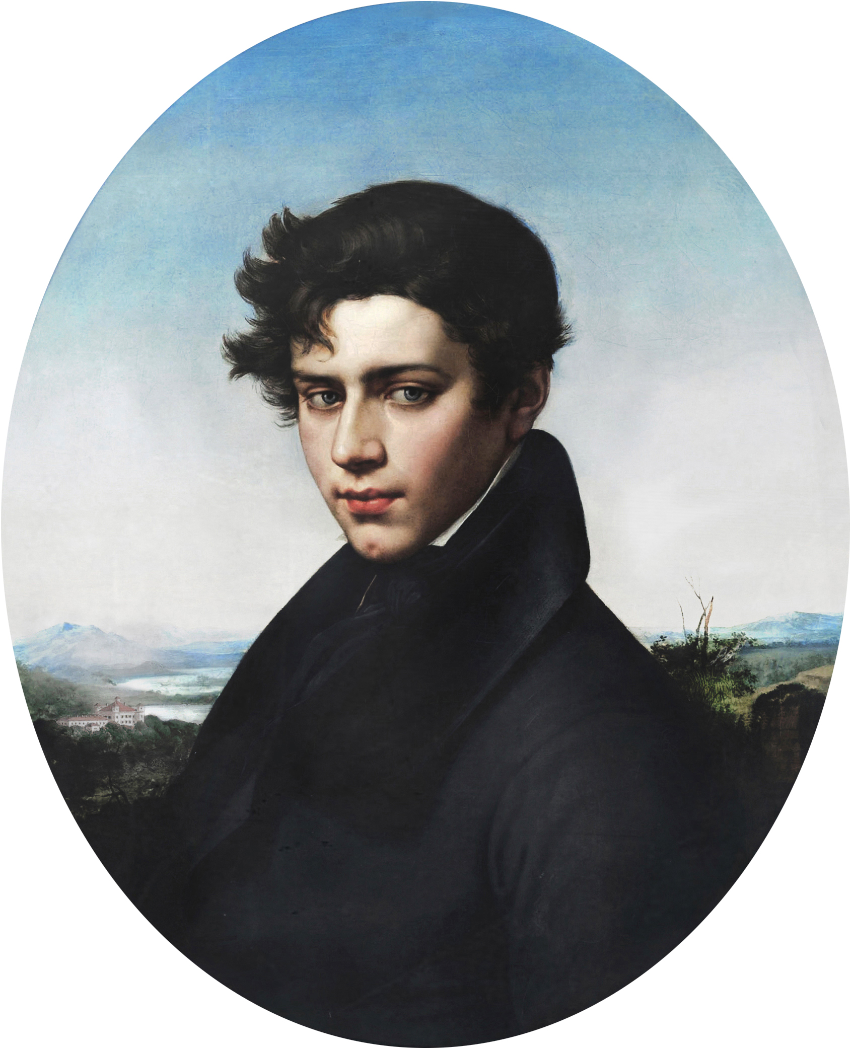 Herzog Maximilian Joseph von Wittelsbach Zweibrucken (1808-1888)